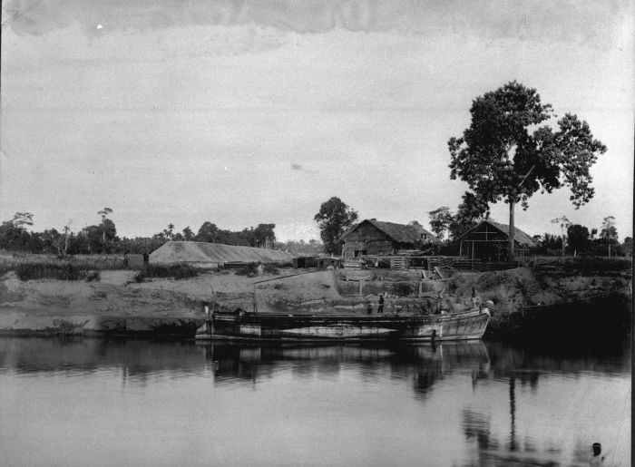 foto. Bivak Lhoksoekon, Atjeh